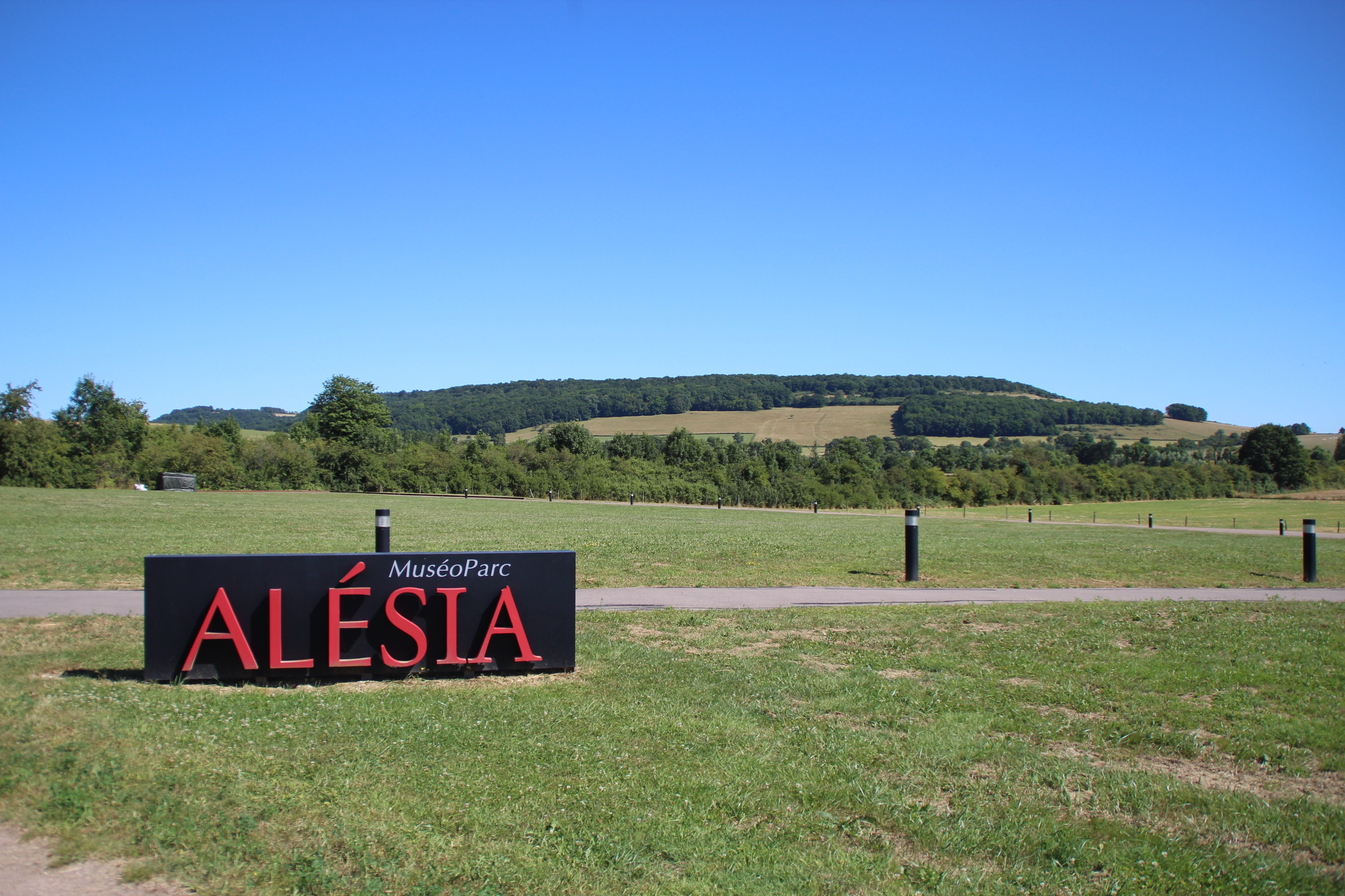 MuséoParc Alésia